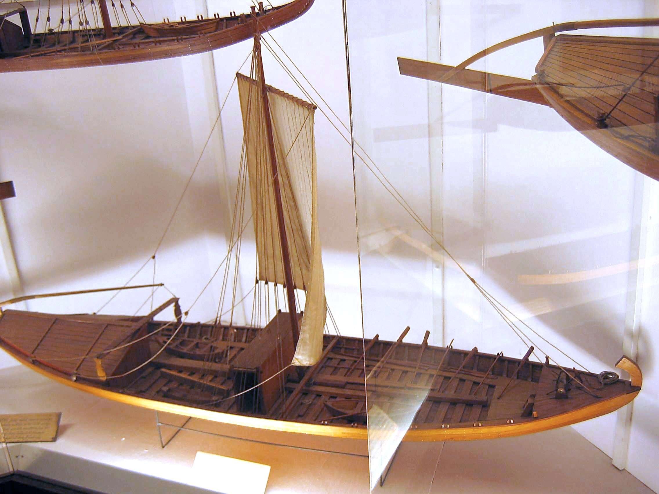 Szkuta